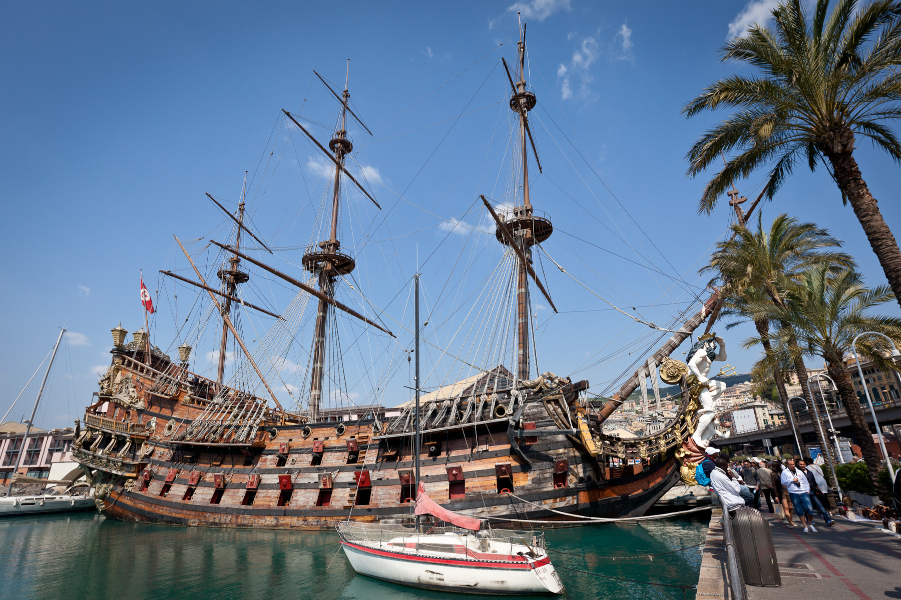 Genova